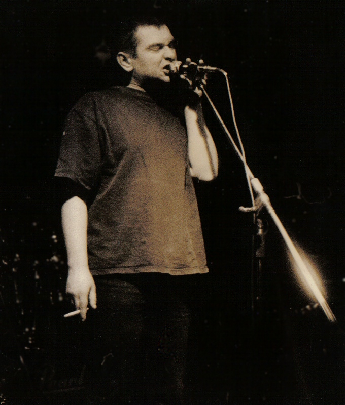 Marcin Świetlicki w czasie koncertu Świetlików w Nowej Soli 07.02.1997 Autor: Mohylek